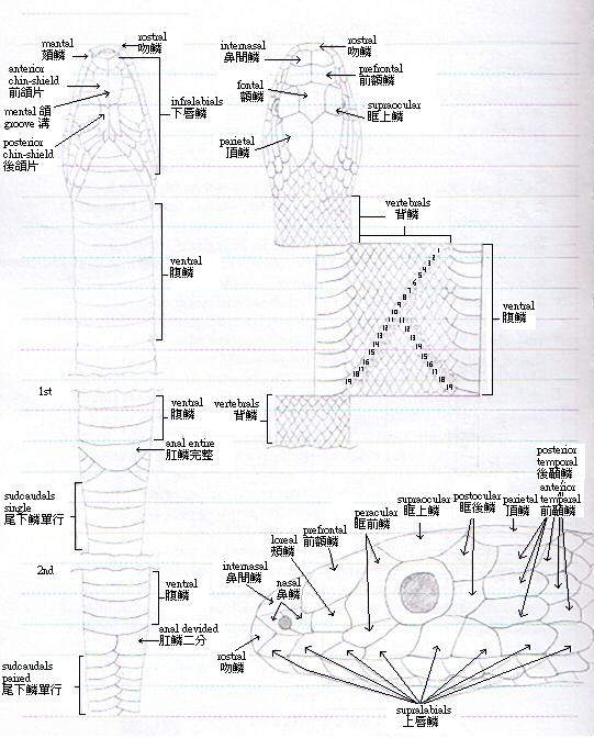 蛇